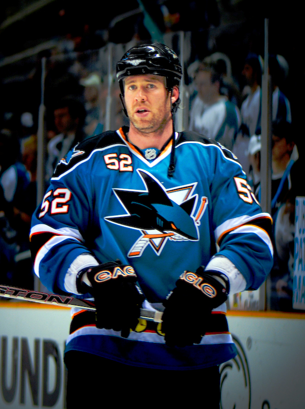 Craig Rivet